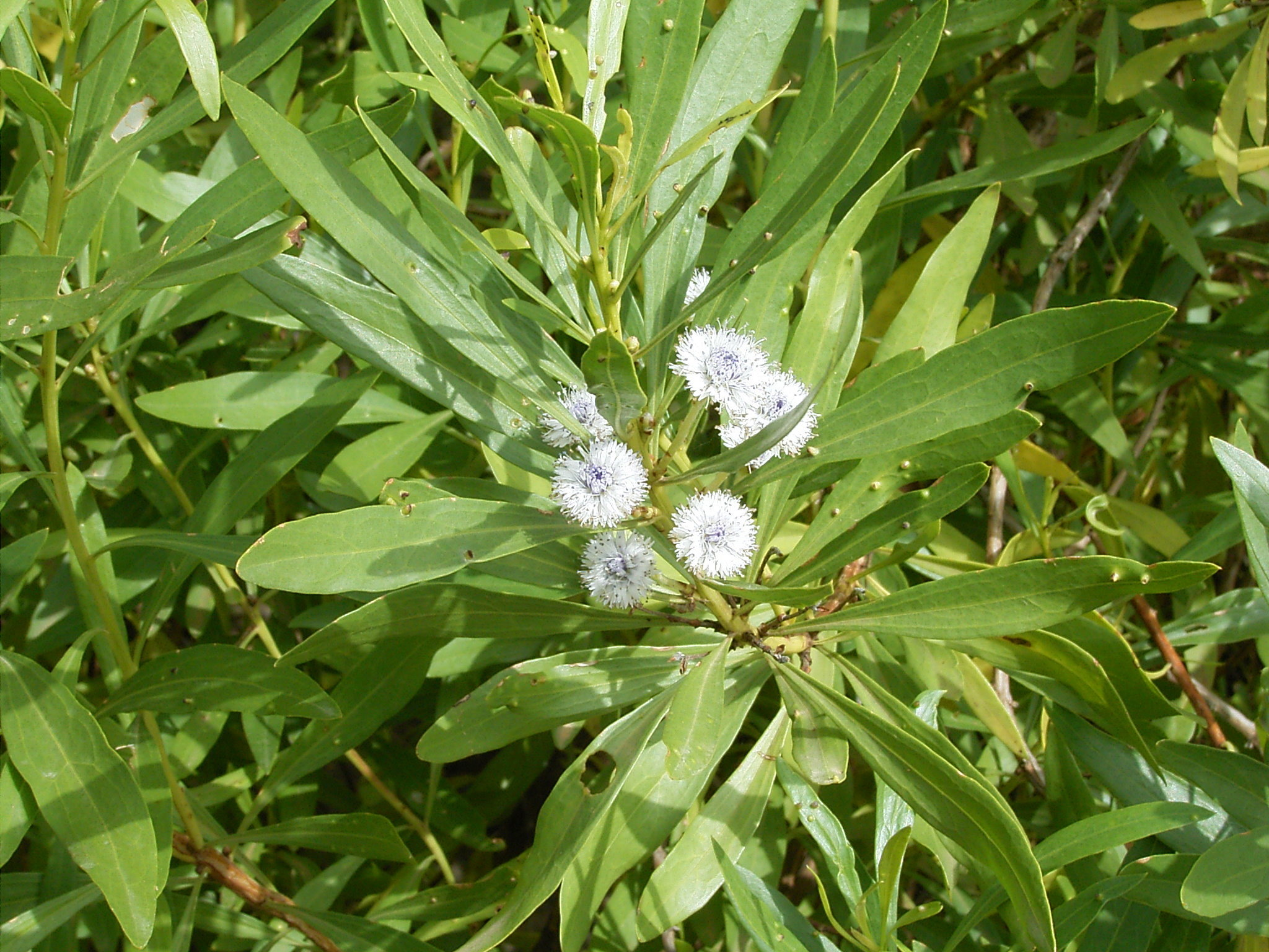 Globularia salicina growing in Puntallana, La Palma, Canary Islands